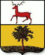 Герб города Горбатов, утвержден 16 августа 1781 года, когда он был уездным городом Нижегородского наместничества